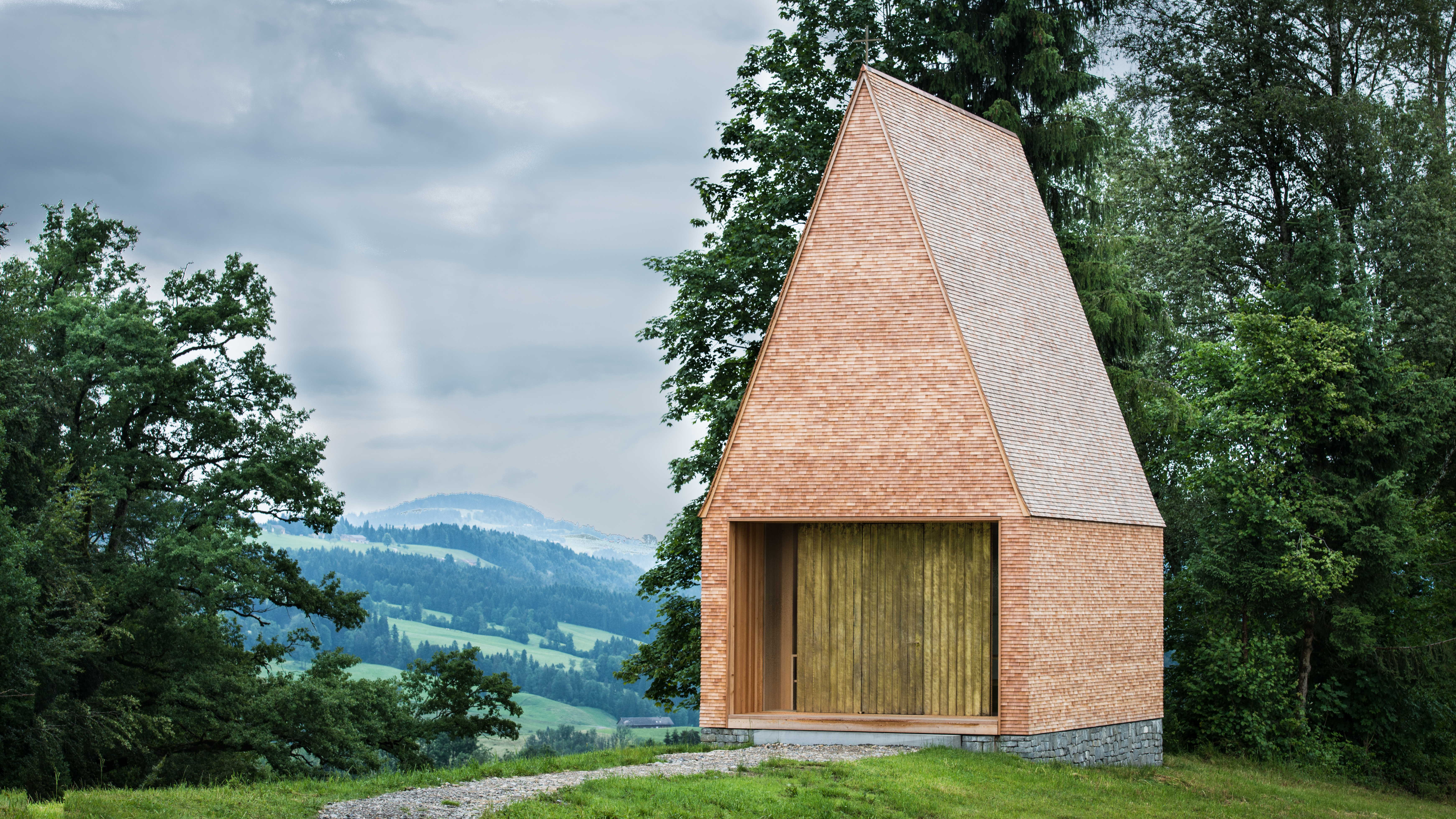 Die Kapelle in der Parzelle Salgenreute, 6942 Krumbach, wurde nach Plänen des Architekturbüros Bernardo Bader von heimischen Handwerkern und freiwilligen Helfern errichtet.